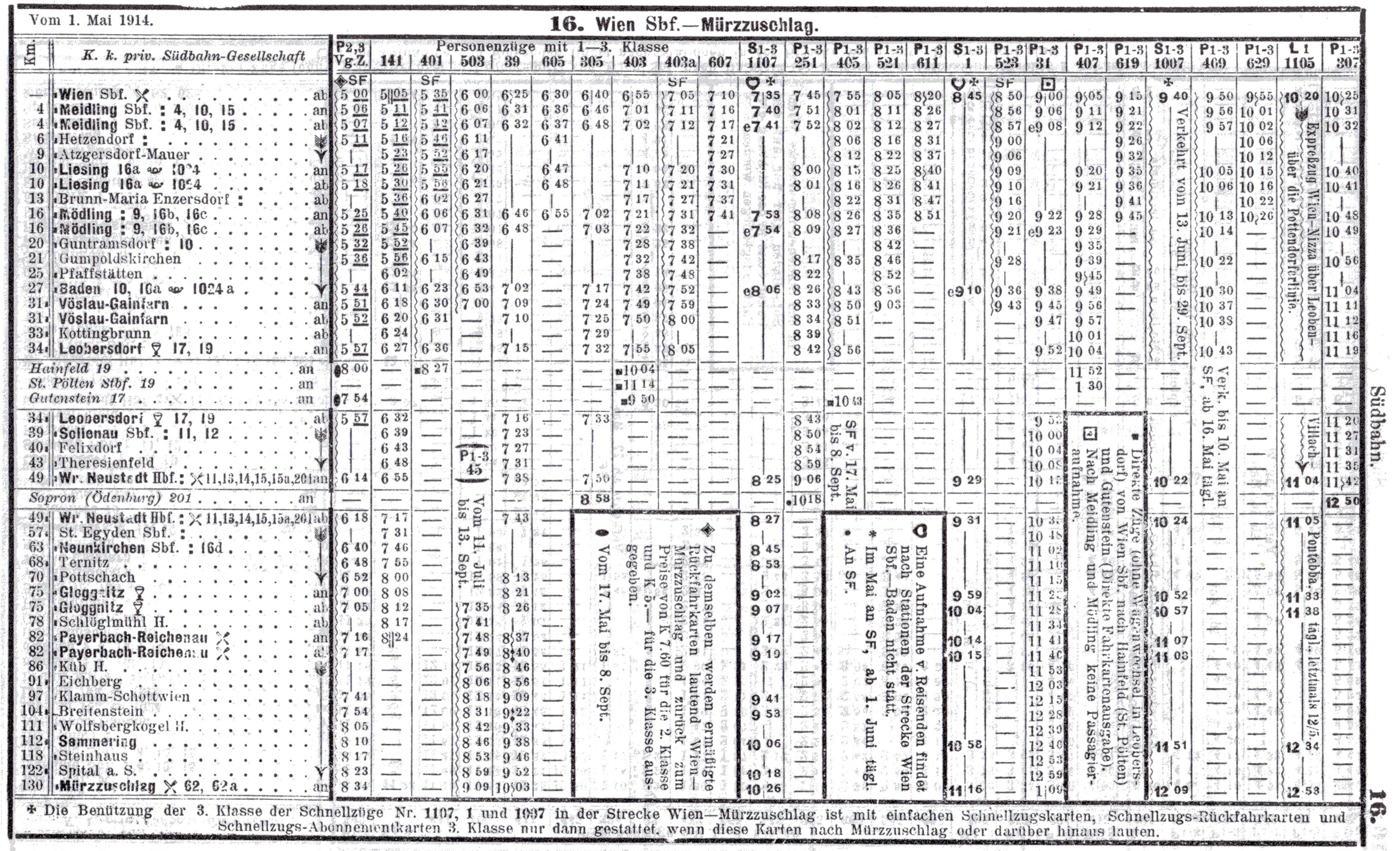 Fahrplanauszug der Strecke Nr. 16: Wien Südbahnhof - Mürzzuschlag aus dem amtlichen Kursbuch Ausgabe Nr. 6 August-September 1914 (letzter Fahrplan der Südbahn über den Semmering in Friedenszeiten vor dem 1. Weltkrieg). Die beiden Punkte nach dem Namen des Bahnhofs bedeuten, dass sich im Ort mehrere Bahnhöfe befanden (konkret war z. B. bei Hetzendorf der Bahnhof Unter-Hetzendorf der Verbindungsbahn gemeint, ca. 130 Meter nördlich, was sich aus einer eigenen Tabelle des Kursbuches ergab). Die schwarzen Kästchen am senkrechten Strich links des Bahnhofsnamens geben an, auf welcher Seite des Zuges sich im Regelfall in der jeweiligen Station der Bahnsteig befand, an dem ausgestiegen werden sollte (abhängig von der Fahrtrichtung, auf der hier dargestellten Südbahn wurde links gefahren).